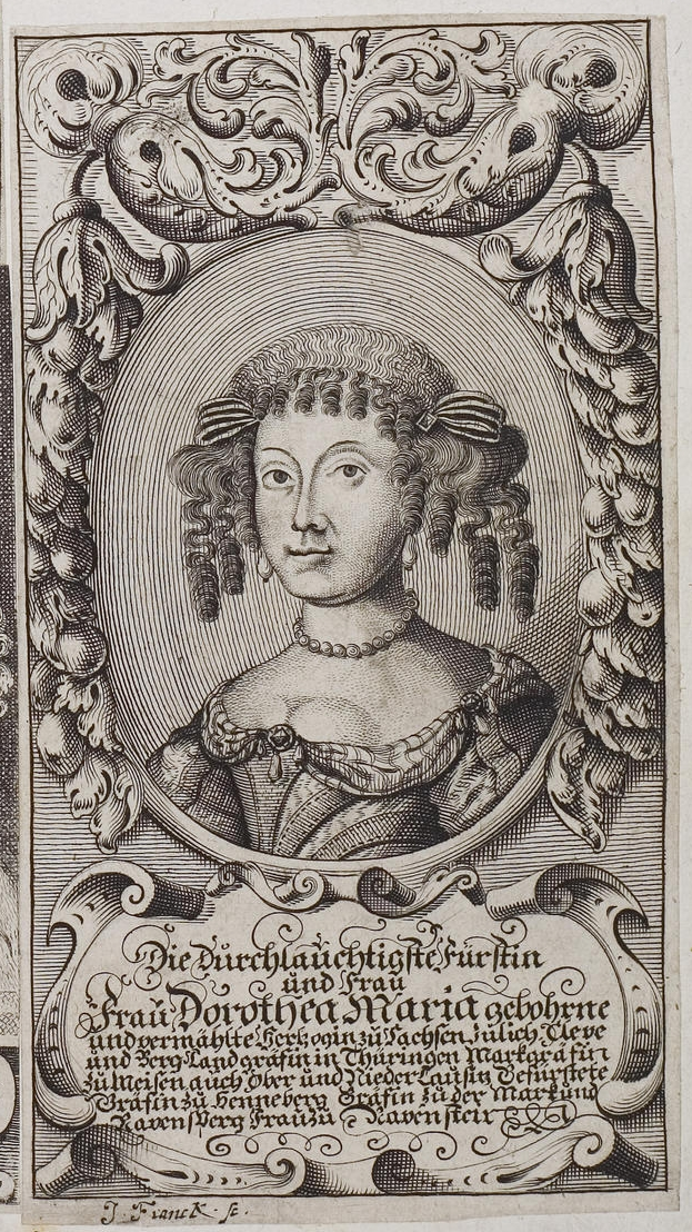 Grafik aus dem Klebeband Nr. 2 der Fürstlich Waldeckschen Hofbibliothek Arolsen Motiv: Dorothea Maria Prinzessin von Sachsen-Weimar (1641–1675), als Ehefrau von Moritz von Sachsen-Zeitz Herzogin von Sachsen-Zeitz